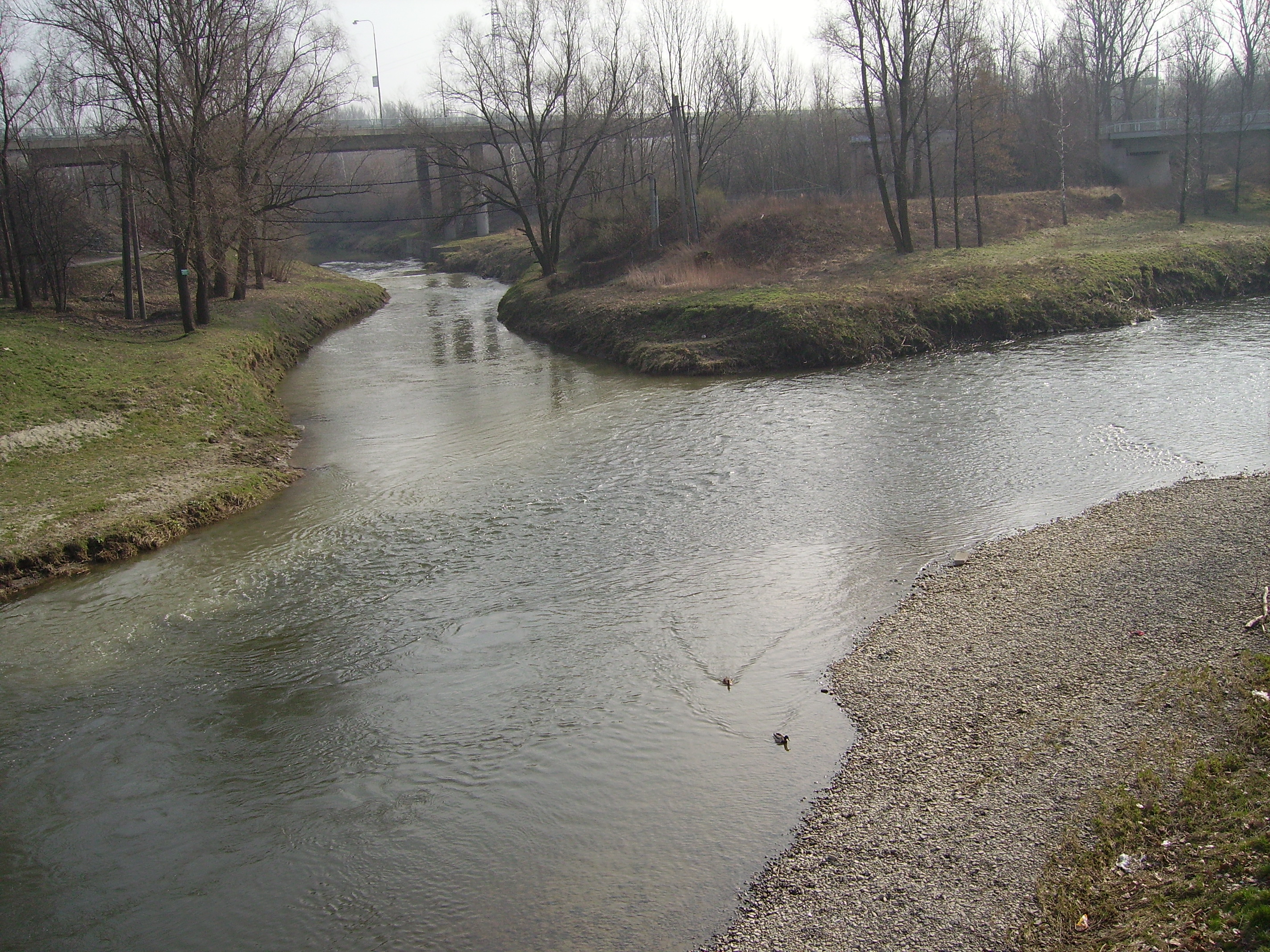 Ostrava02_Ostravice_Lucina.JPG